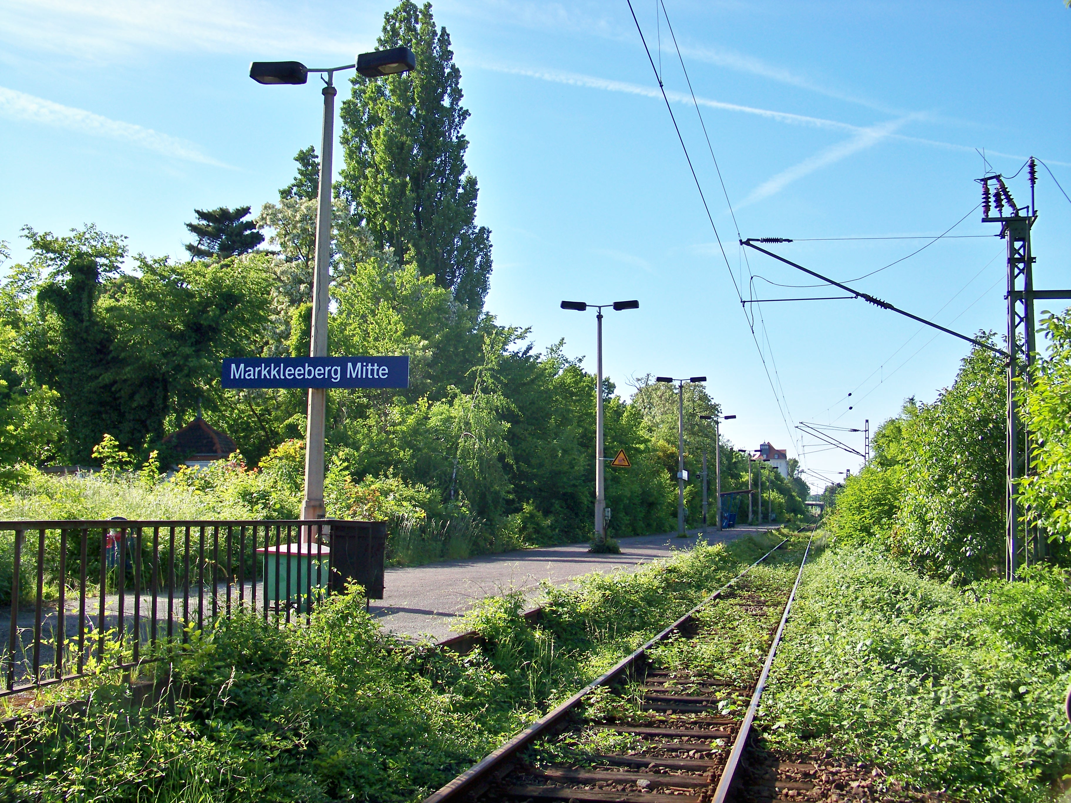 Ehemaliger Haltepunkt Markkleeberg Mitte